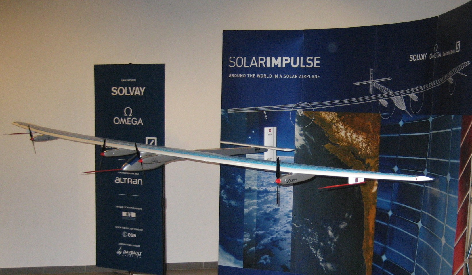 Maquette du Solar Impulse exposée à Genève en 2008.